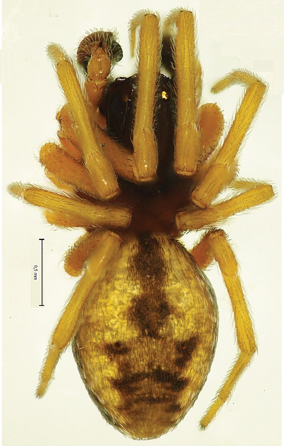 Dictyna major male